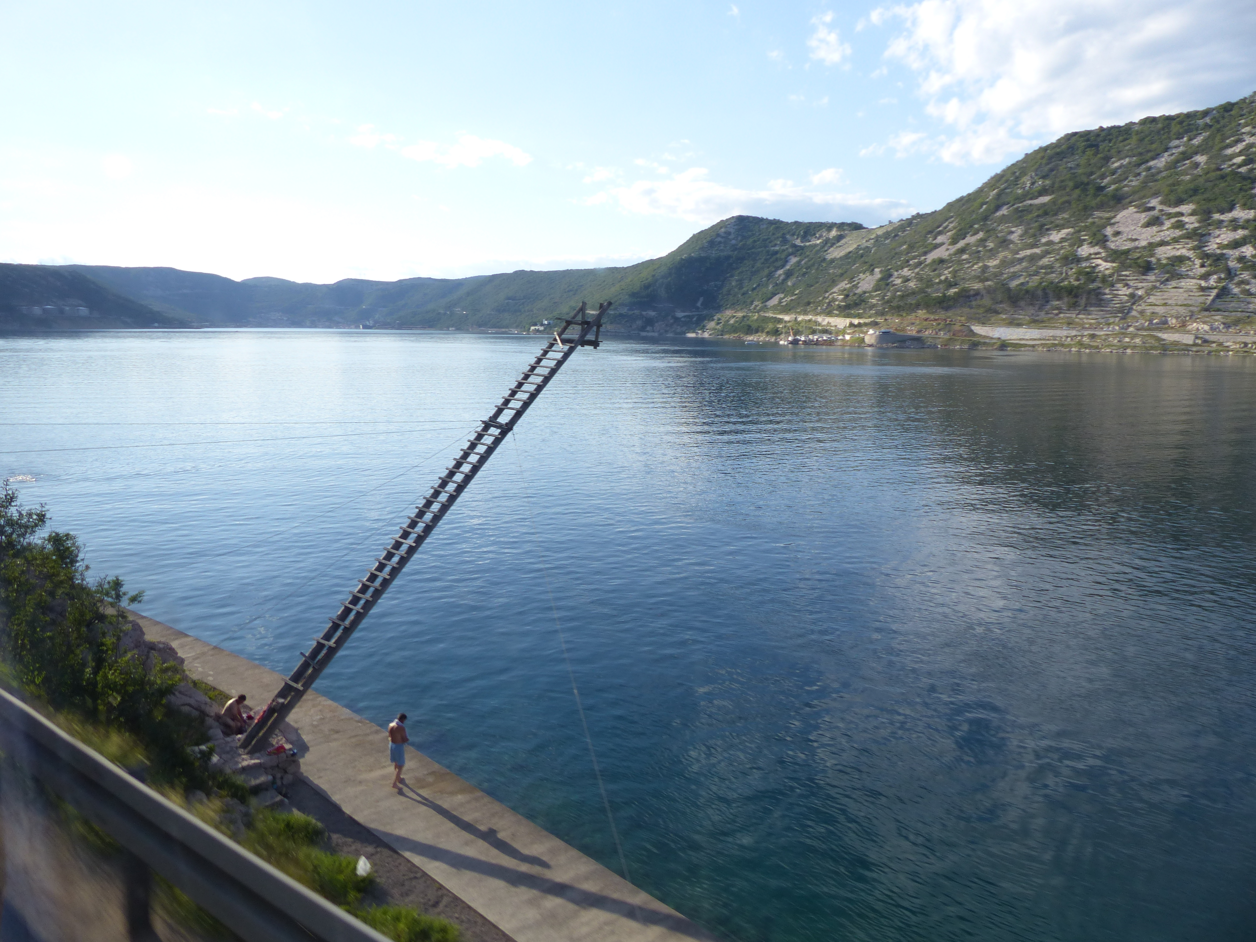 A felvétel 2016. junius 28-án készült. Adria. (Abbázia-Crickvenica parti út). A vonuló tonhalak megfigyelésére figyelő árbocok szolgáltak. A létraszerű építmény felső végén egy ülés volt, ebben tartózkodott a tonhalak vonulását figyelő halász. Ahogy megérkezett a halraj, a csónakokban várakozó halászok a fenn ülő kémlelő utasításai szerint vetették ki a hálóikat. Források